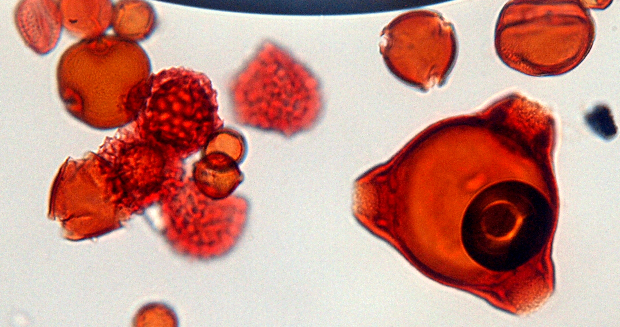 Õietolmuterad mee seest